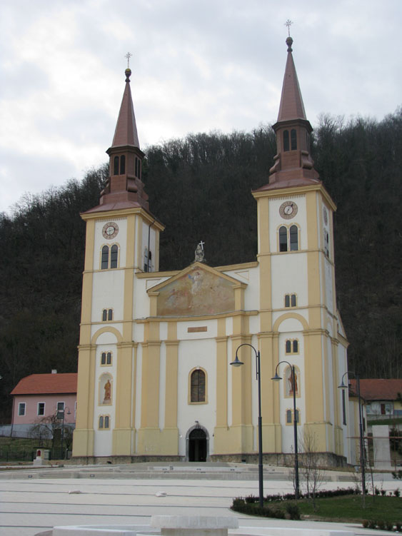 Župna Crkva Uznesenja Blažene Djevice Marije, Pregrada